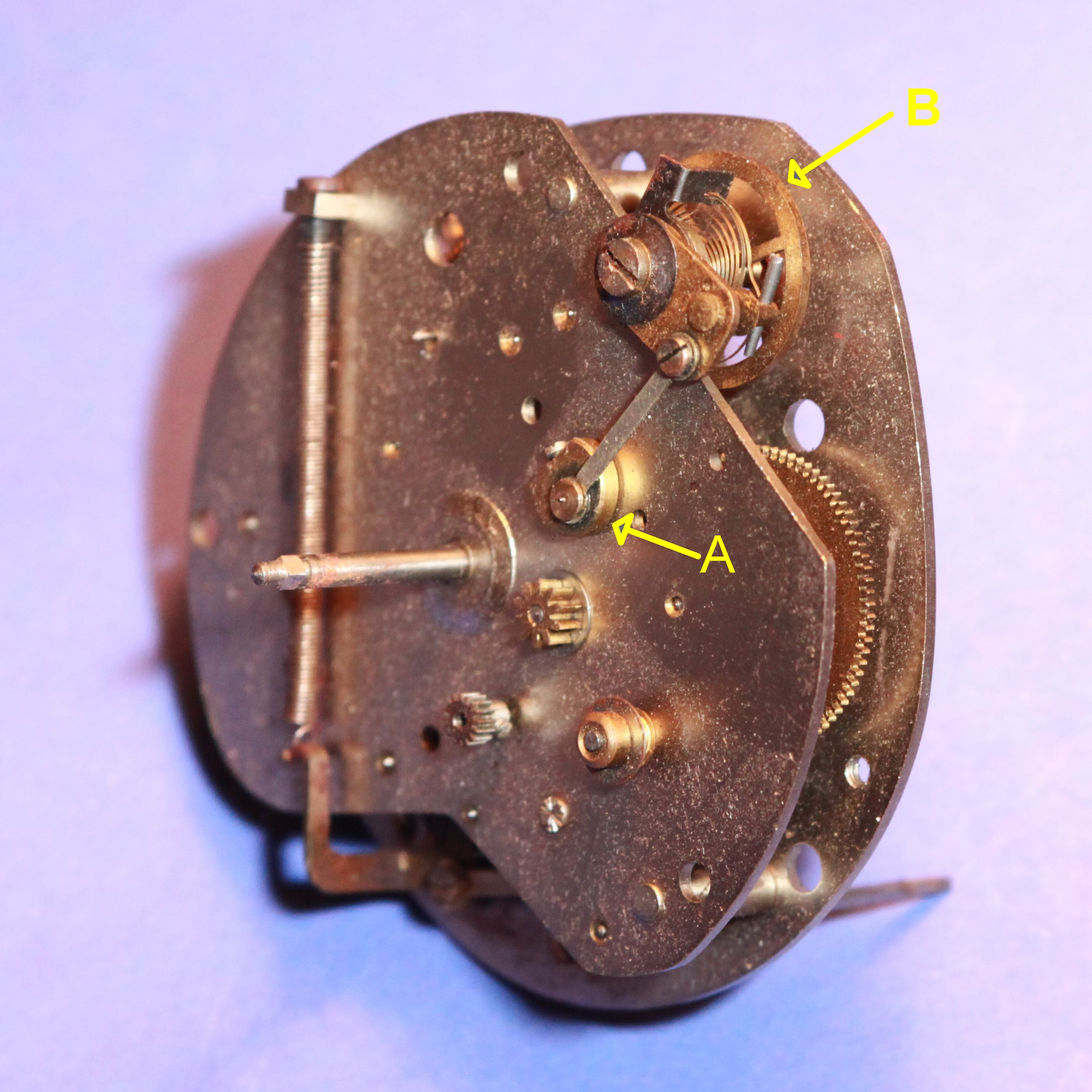 Uhrwerk einer Mauthe Synchronuhr mit Gangreserve. Die Unruhe B wird durch einen Exzenter A über das Synchronwerk zu einer erzwungenen Schwingung angeregt. Dadurch entpspricht ihre Schwingfrequenz mit der extrem hohen Genauigkeit der Netzfrequenz der Sollfrequenz und die Uhr hat (stabiles Netz vorausgesetzt) keine Gangabweichung.